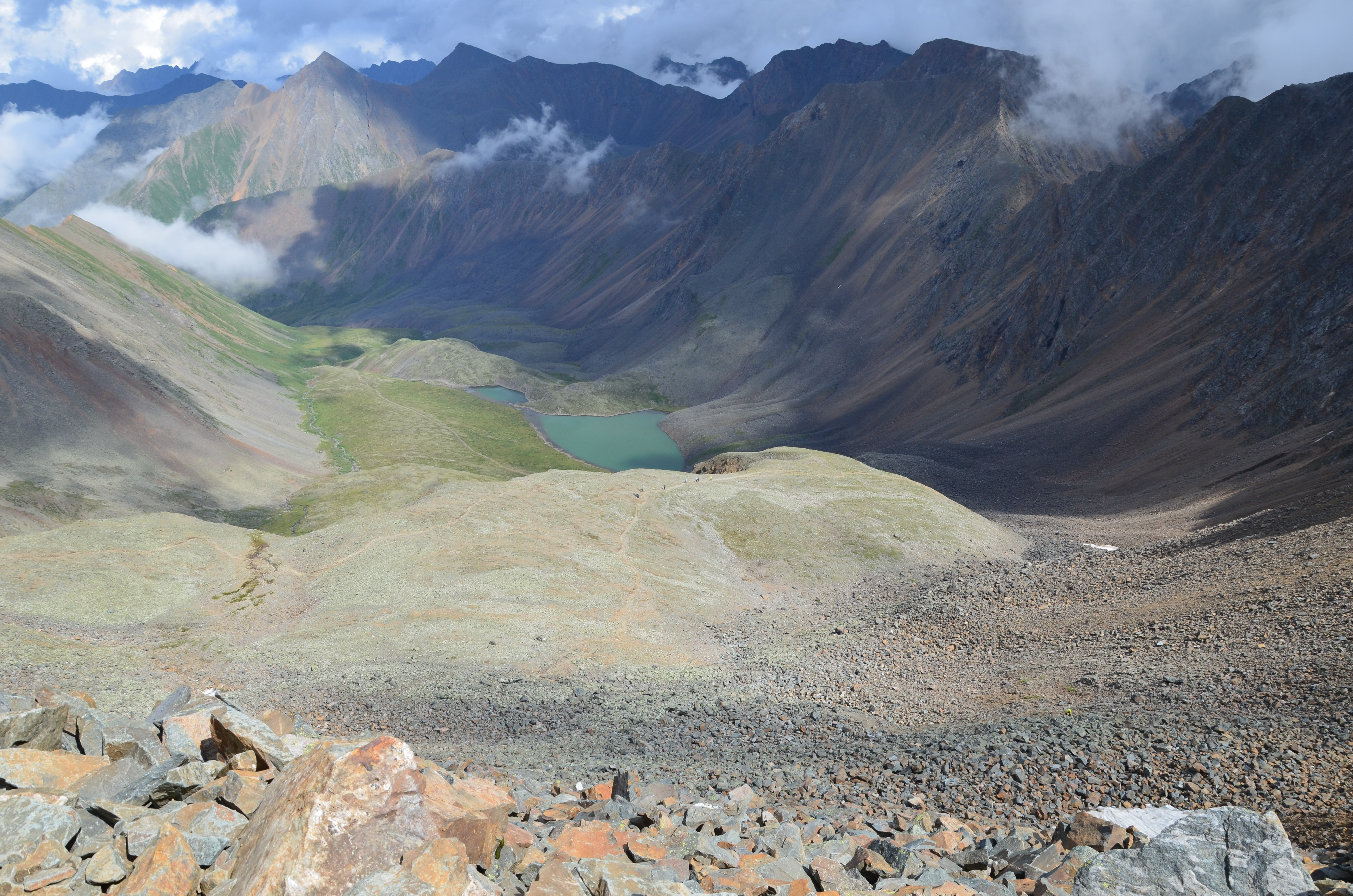 Шумак, Окинский район Перевал Шумакский на пешеходном маршруте п.Нилова Пустынь - Шумак This image is related to the protected area of Russia number 0320070